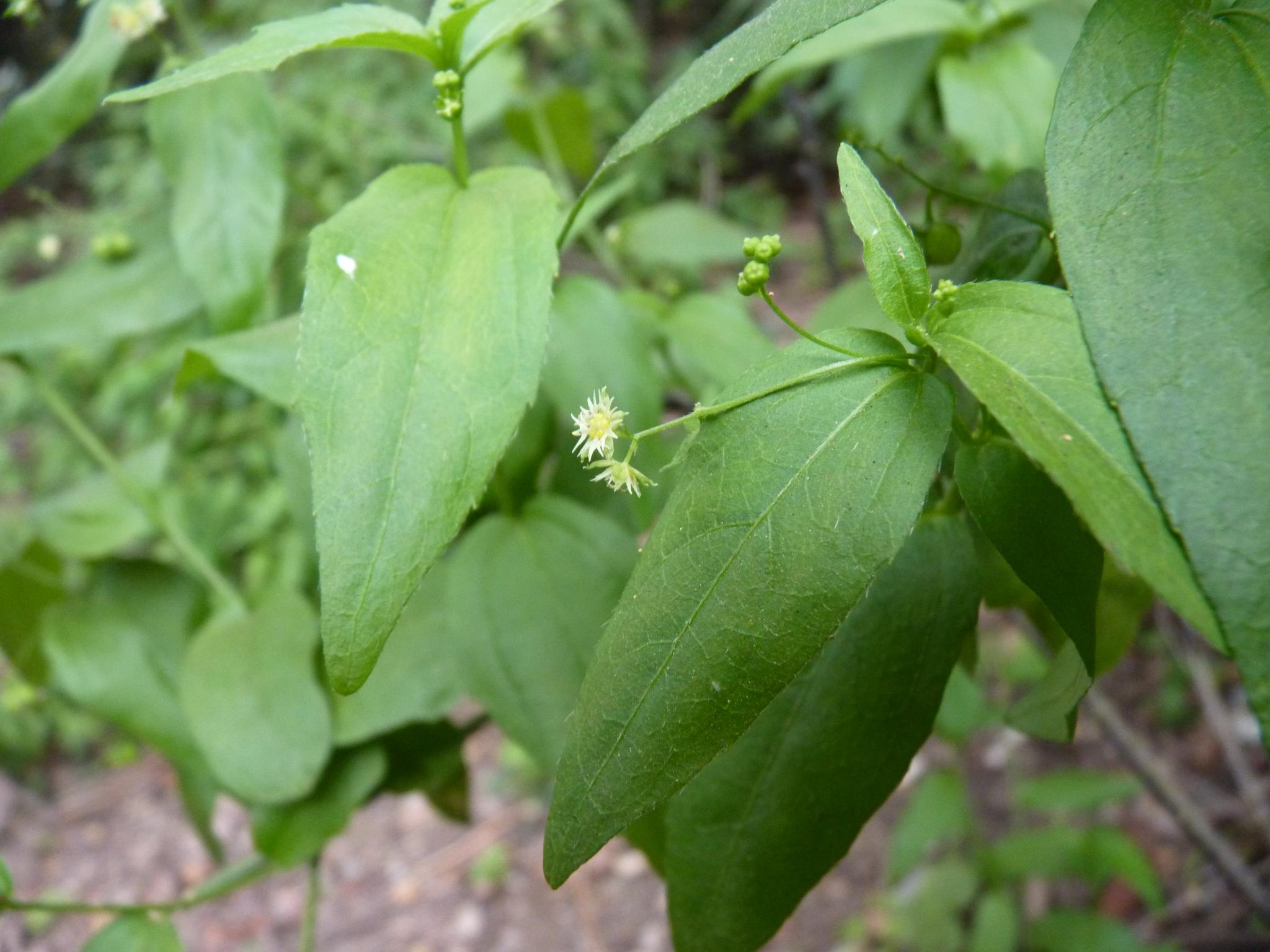 Chiropetalum tricuspidatum